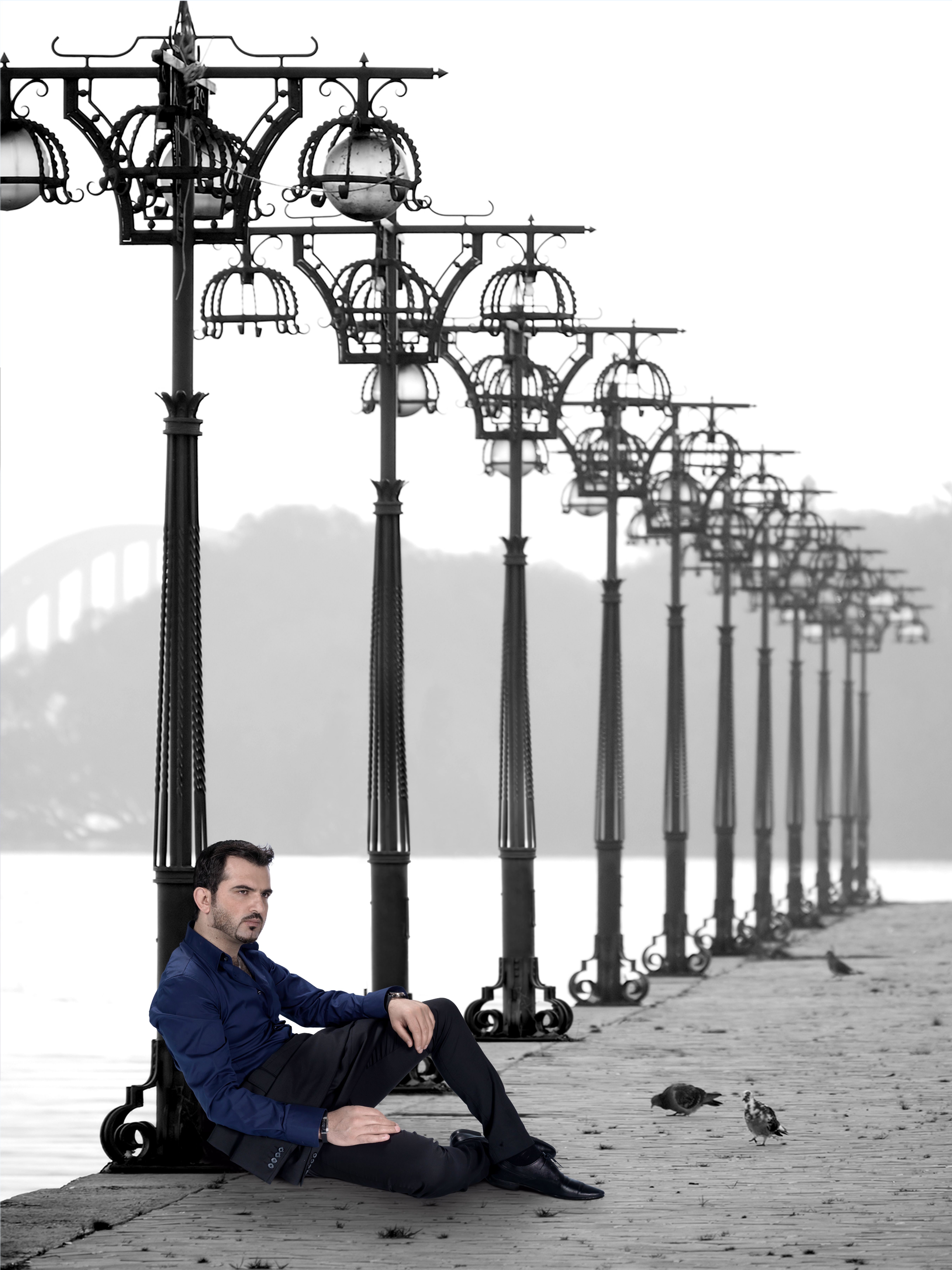 صحفي ومقدم برامج ، باحث في الشؤون السياسية والعلاقات الدولية